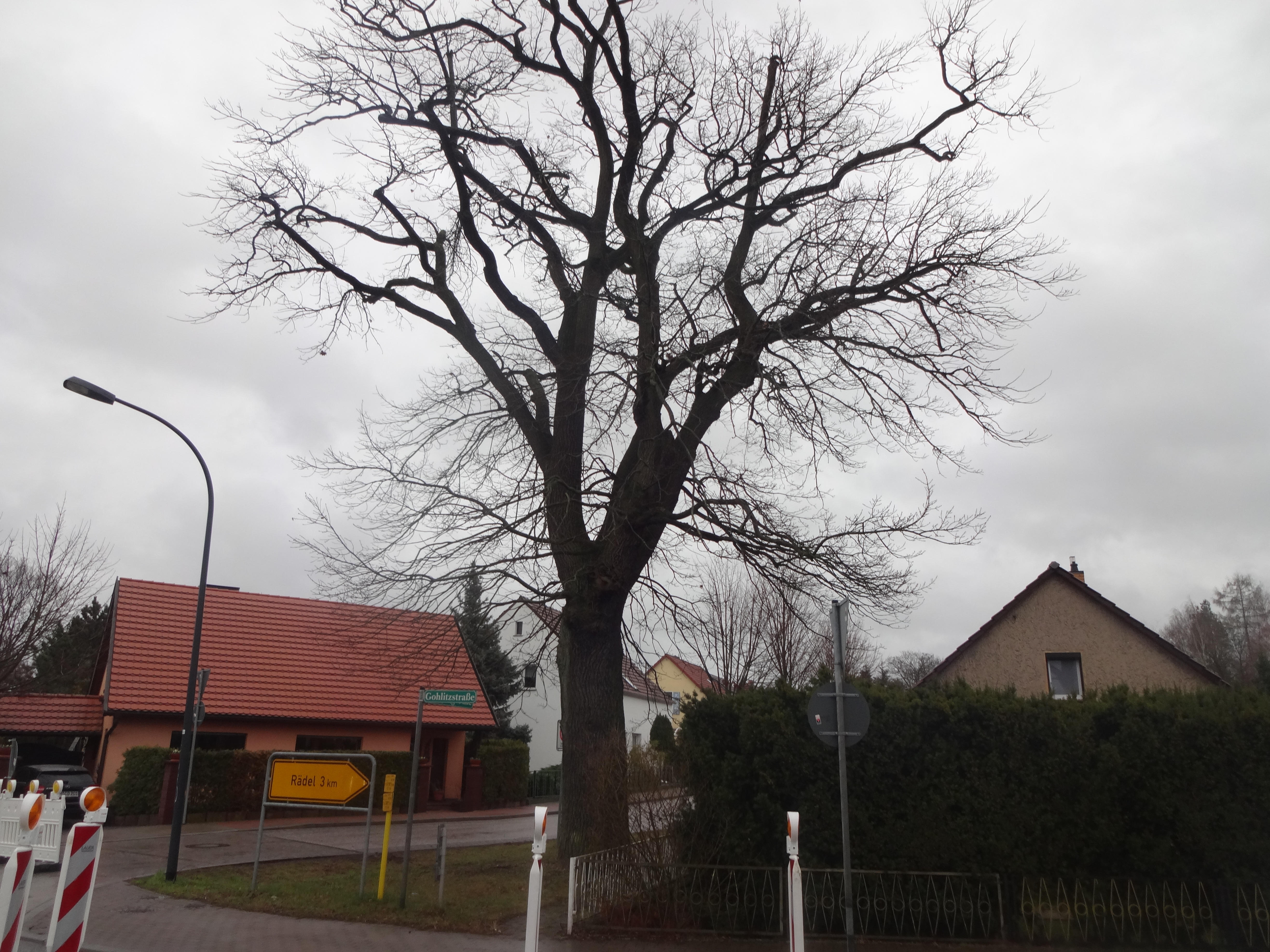 als Naturdenkmal geschützte Stieleiche am Kreisverkehr in Lehnin, die Stieleiche ist zusammen mit einer weiteren Stieleiche geschützt